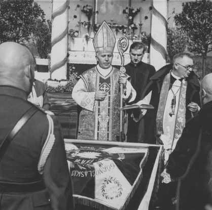 Bp polowy Józef Gawlina poświęca sztandar 75 Pułku Piechoty. Obok niego z mszałem ks. Jan Brandys.